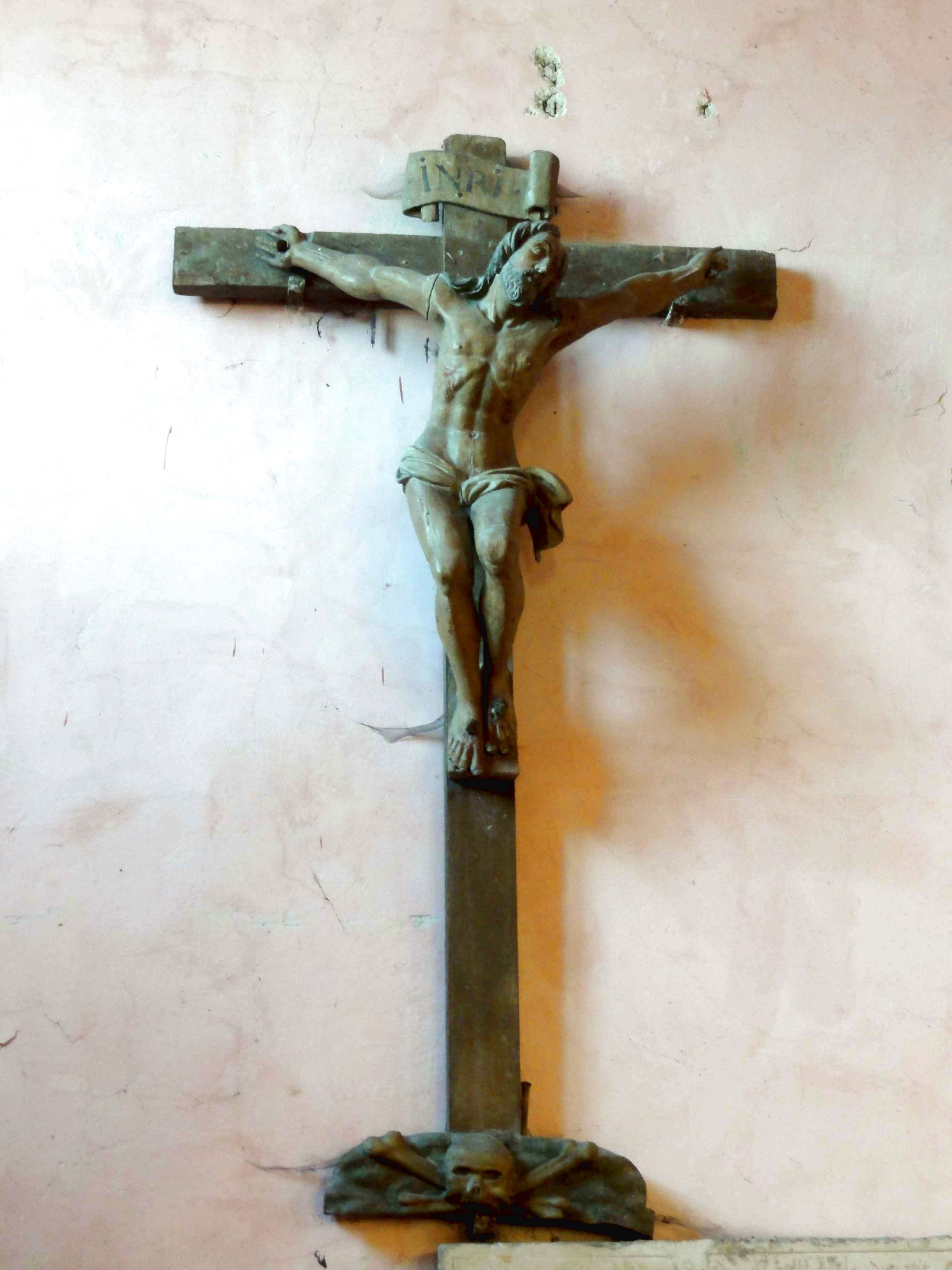 Mobilier de l'église - voir titre.